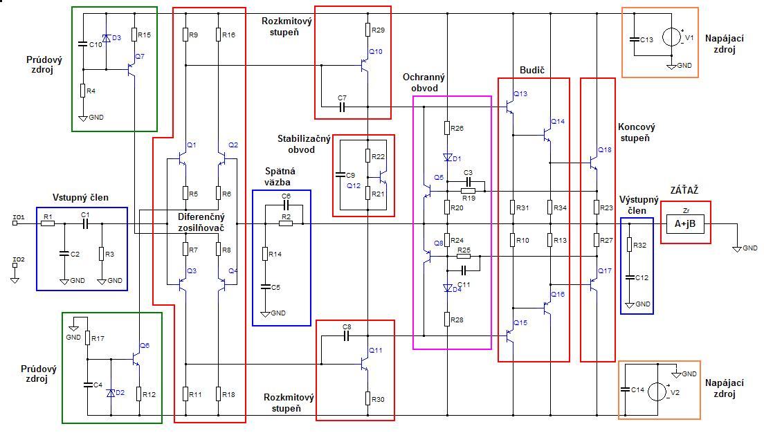 Typické usporiadanie blokov v NF výkonovom zosilňovači.